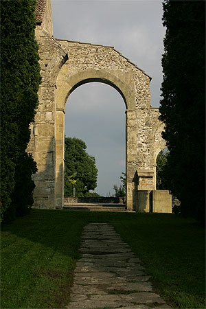 Innenansicht des ehemaligen Klosters Rüeggisberg